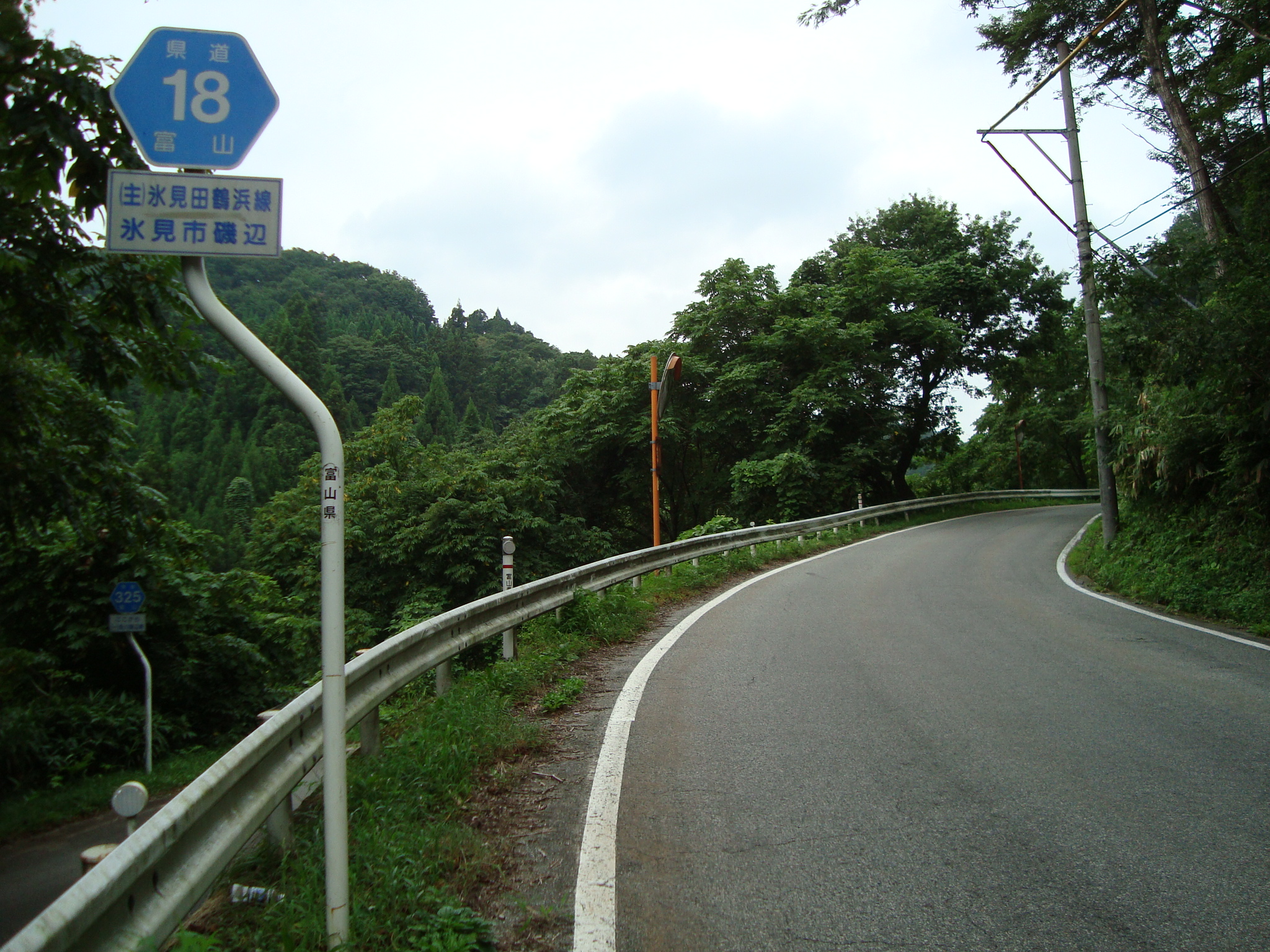 富山県道・石川県道18号氷見田鶴浜線 富山県氷見市磯辺付近